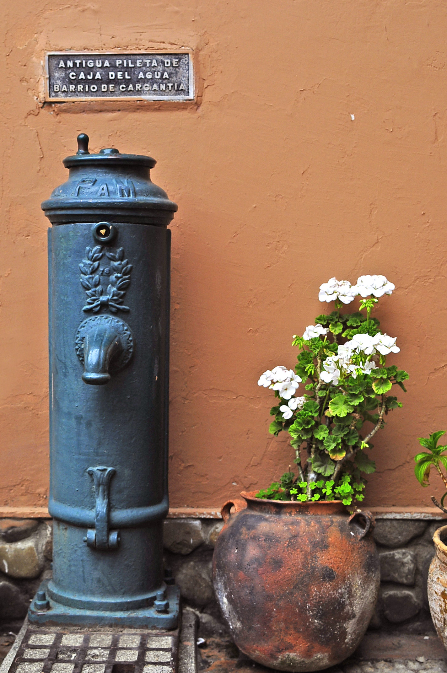 Detalle del Museo Costumbrista "Juan de Vargas", La Paz, Bolivia